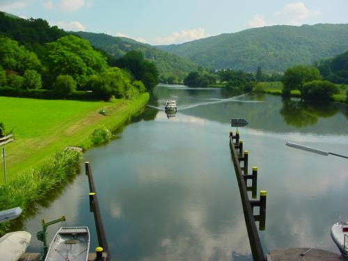 Blick von der Lahnschleuse bei Dausenau, fotografiert Juli 2004 von Reinhard Kraasch